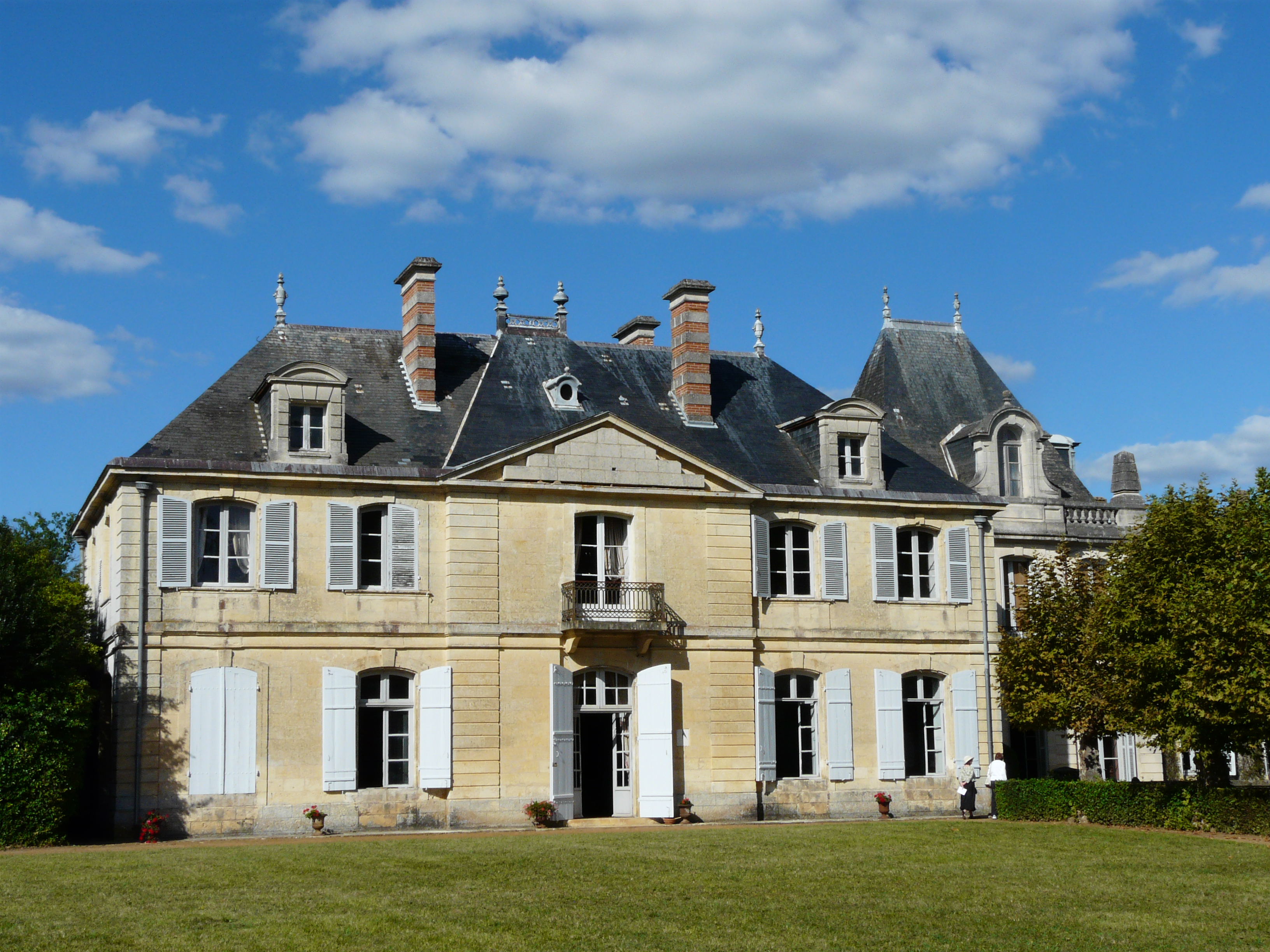 La partie ouest de la façade sud du château de Tiregand, Creysse, Dordogne, France.